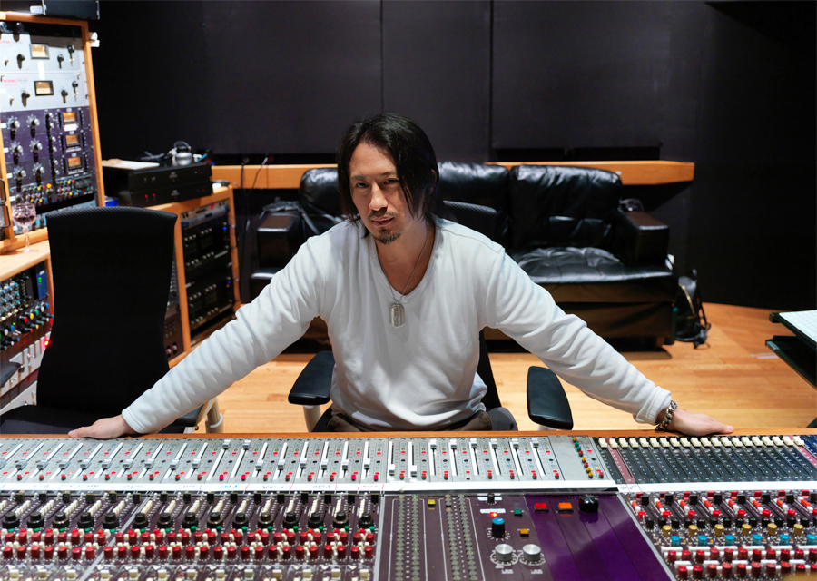 Sadaharu Yagi en el estudio de grabación.